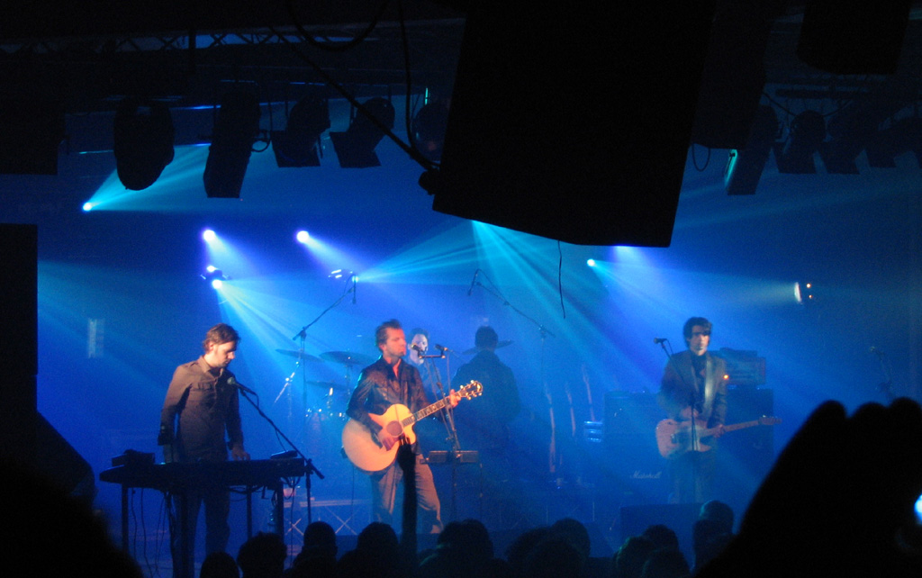 26/11/2005 - Deus al Velvet di Rimini